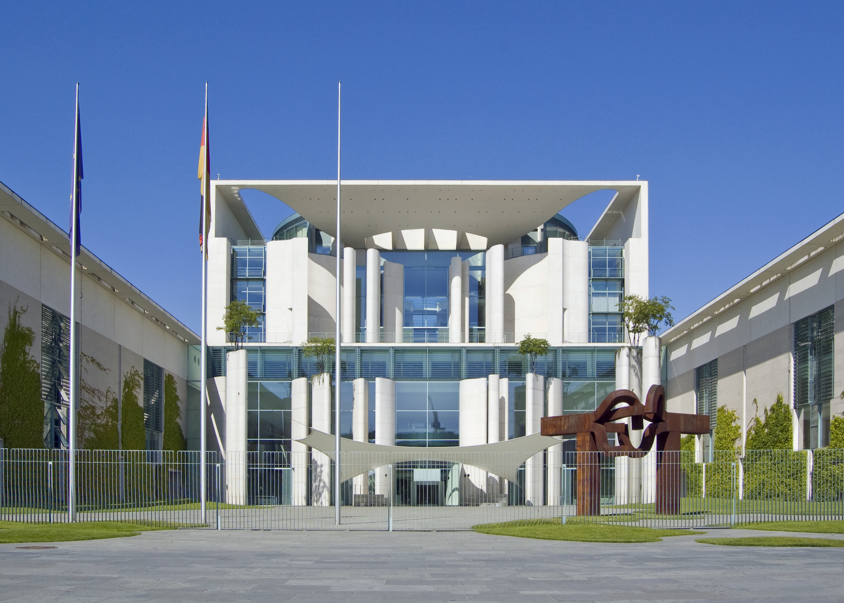 Das Bundeskanzleramt in Berlin, Deutschland.